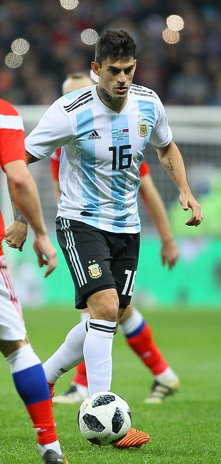 Diego Perotti